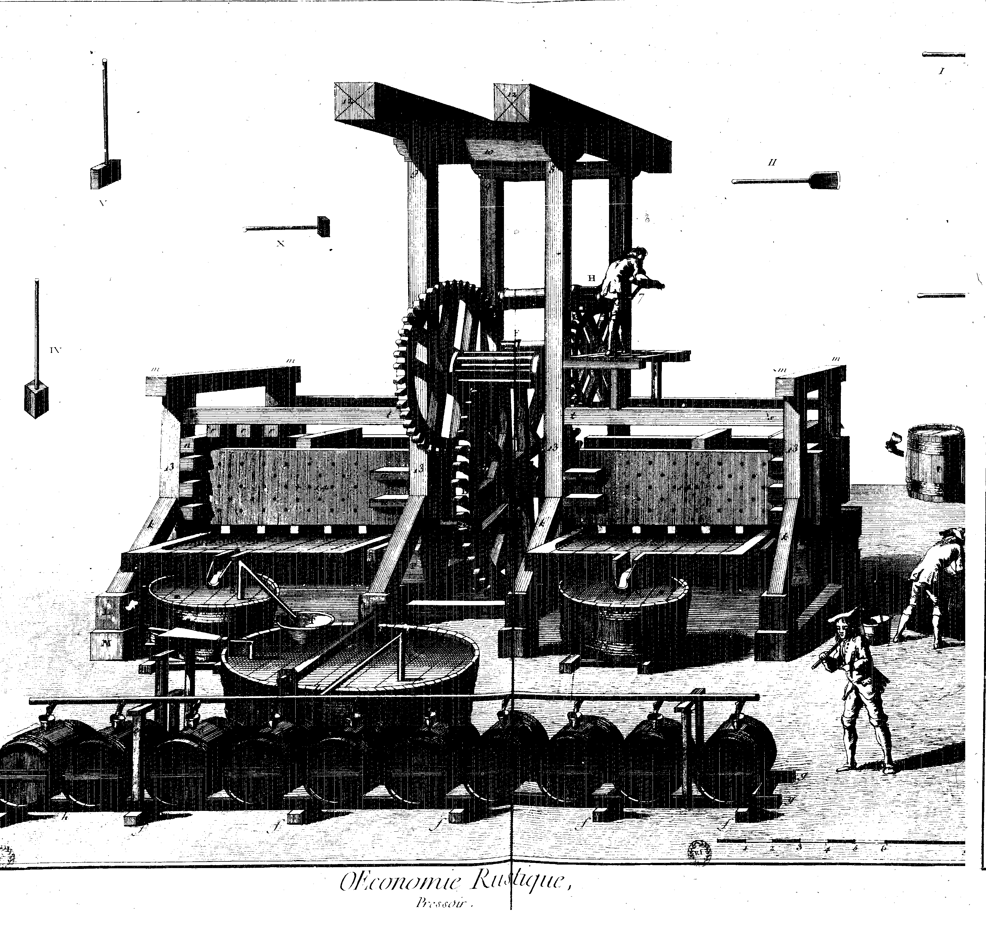 Planches de l'Encyclopédie de Diderot et d'Alembert, volume 1.